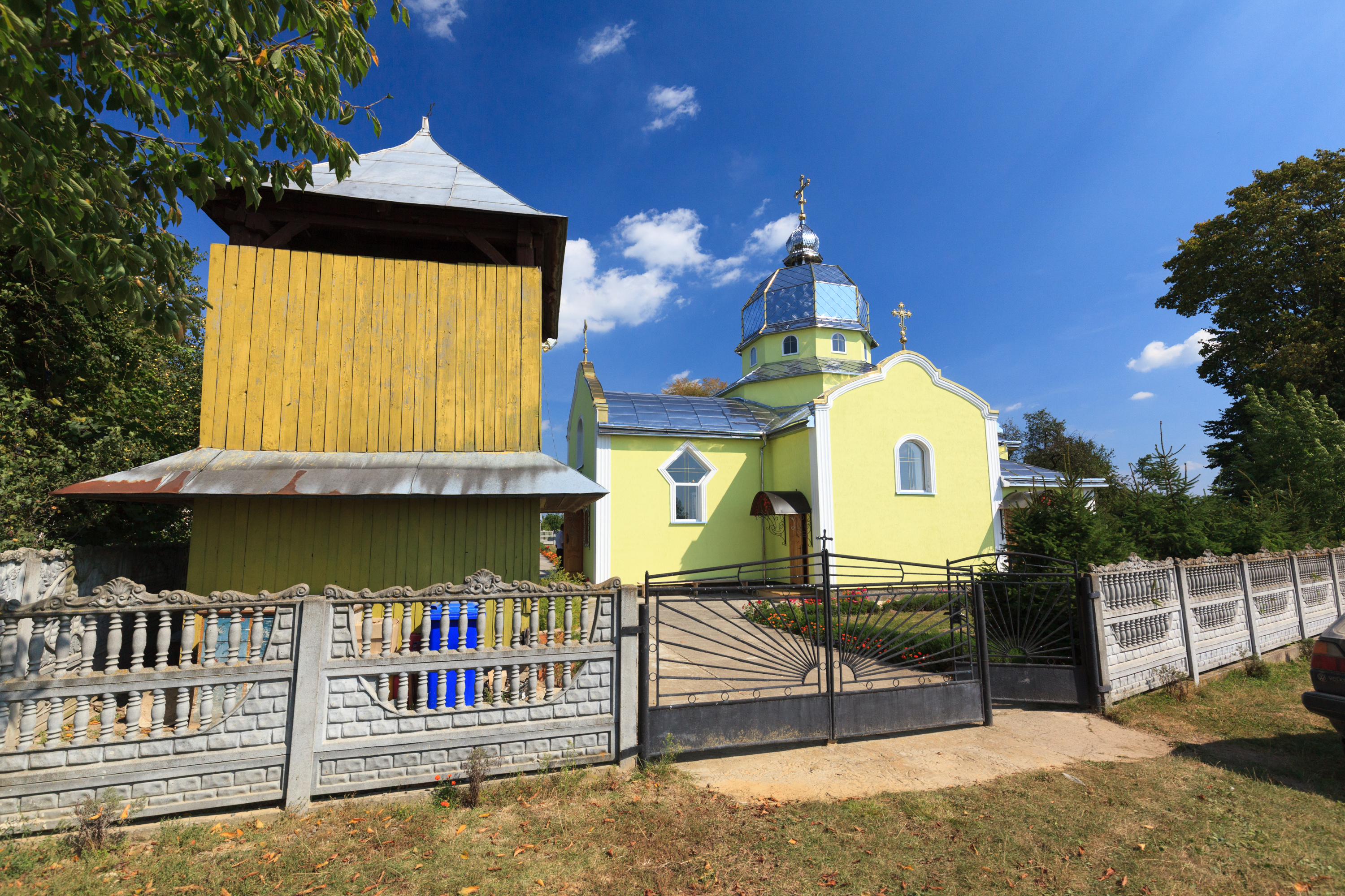 Дзвіниця церкви іоанна Богослова (дер.), с.Семерівка